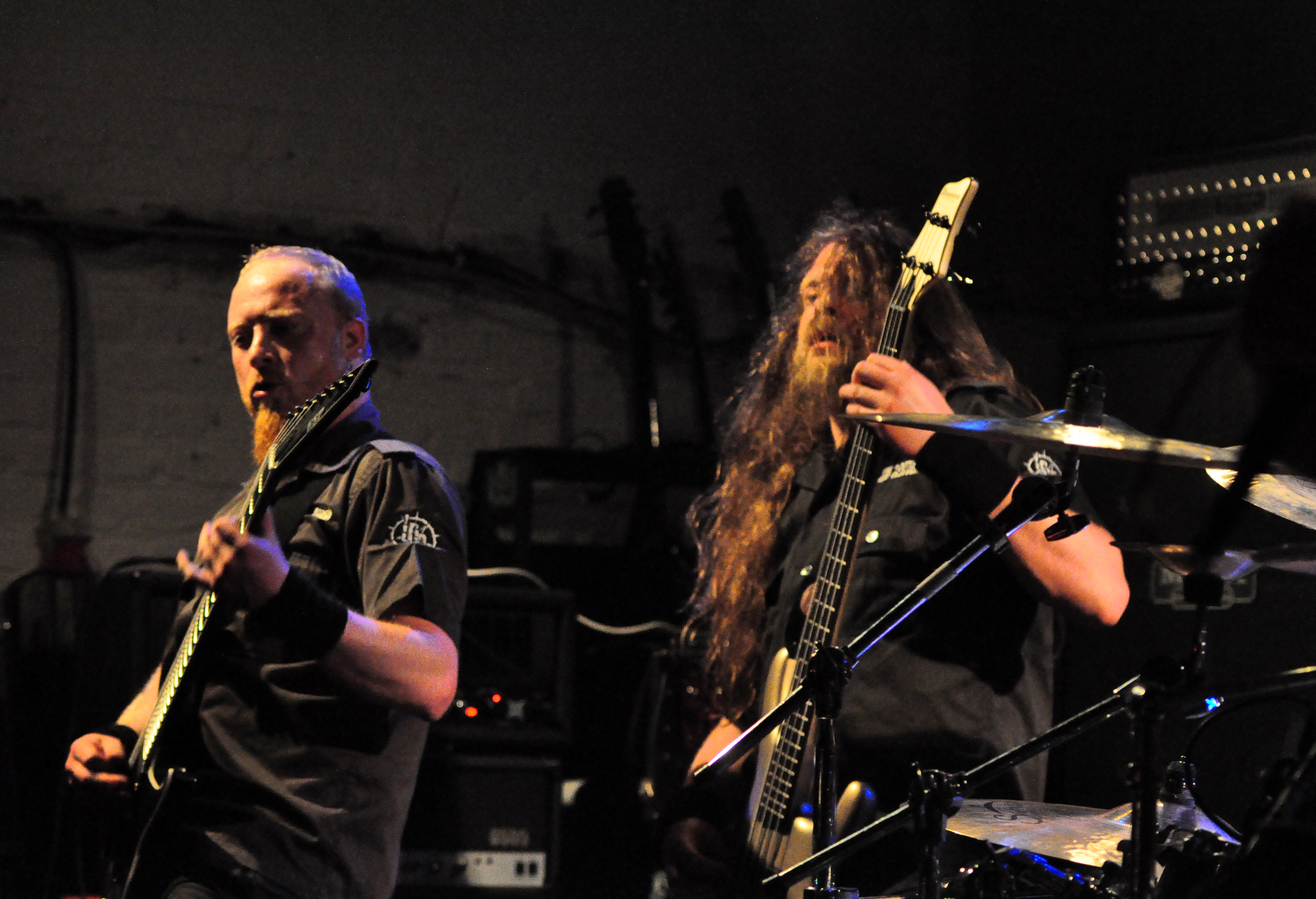 Lay Down Rotten, guitarrist and bassist